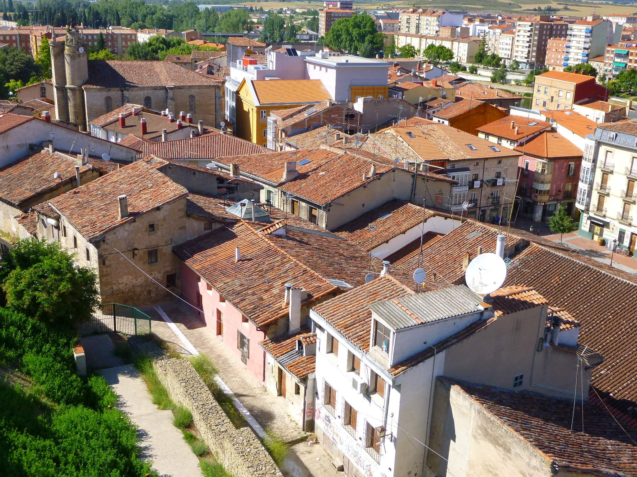 Panorámica urbana de Miranda de Ebro desde el Castillo